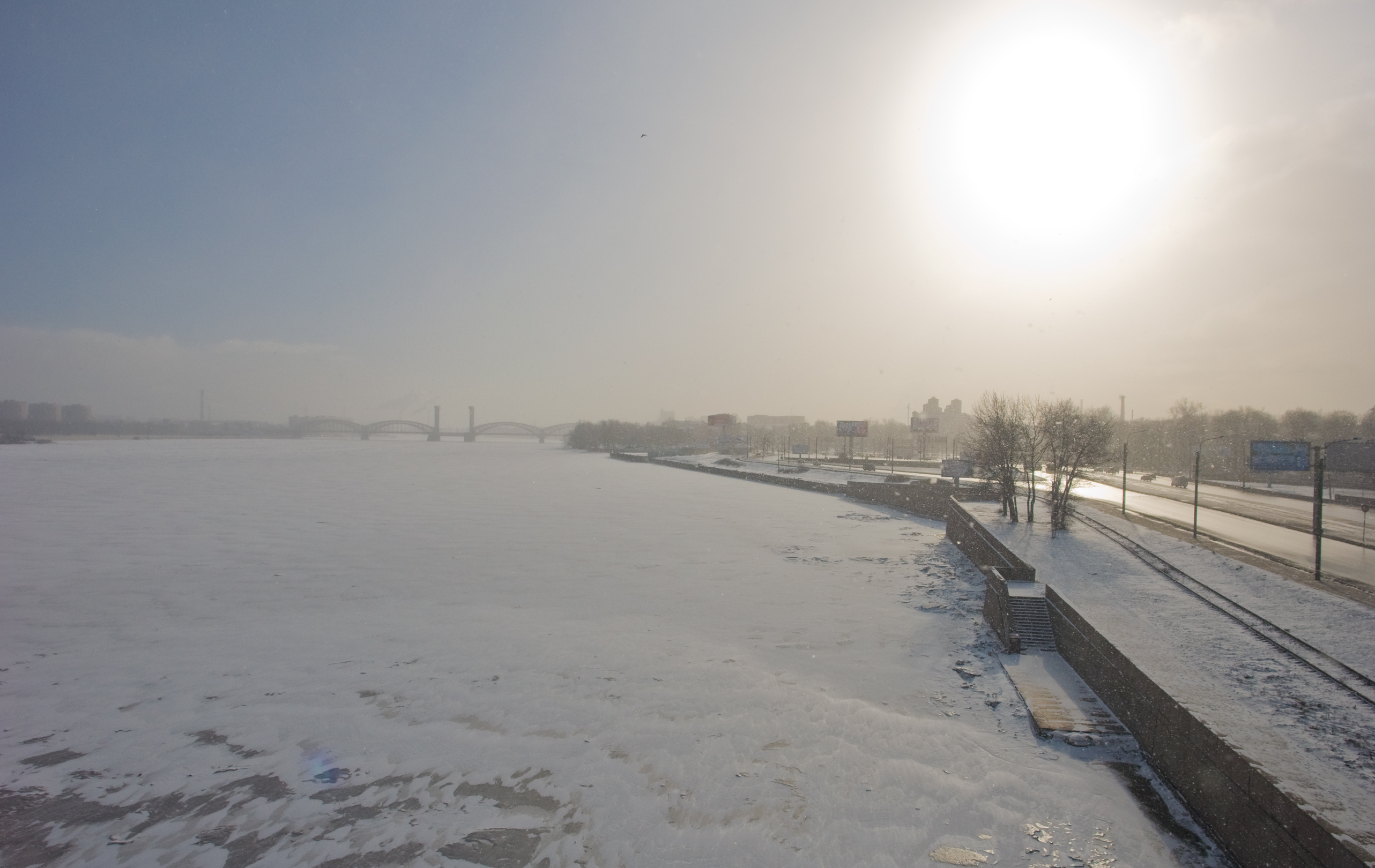 Проспект Обуховской обороны (Вид с моста Александра Невского, Санкт-Петербург)